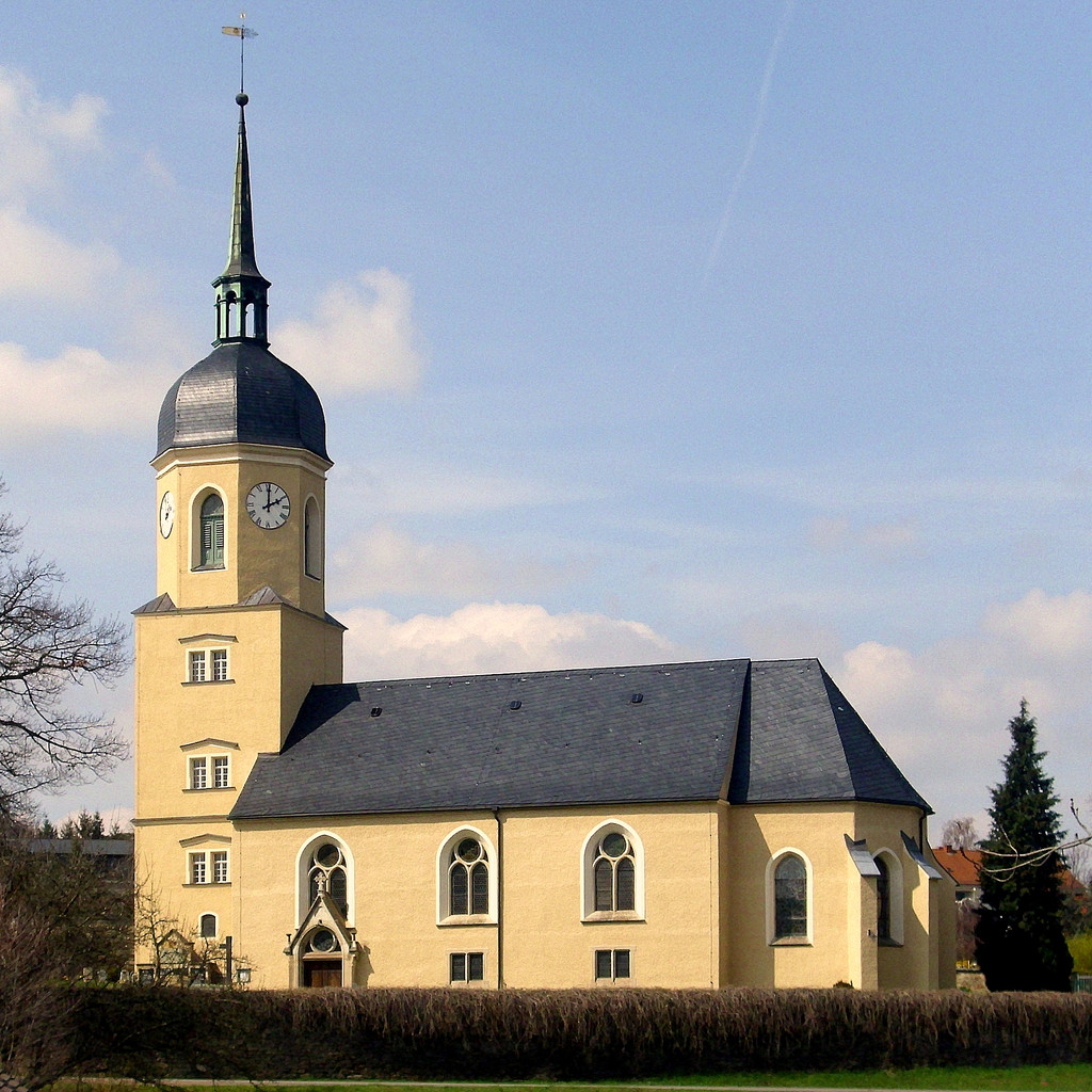 Evangelisch-Lutherische Dorfkirche in Reichstädt bei Dippoldiswalde